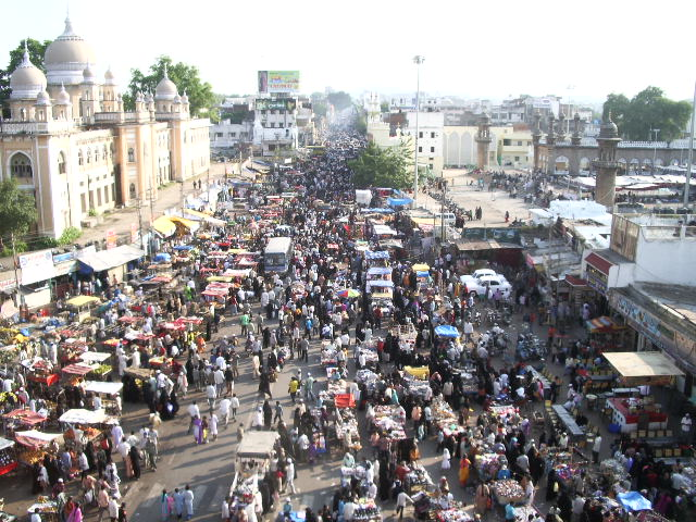 ハイデラバードの喧騒